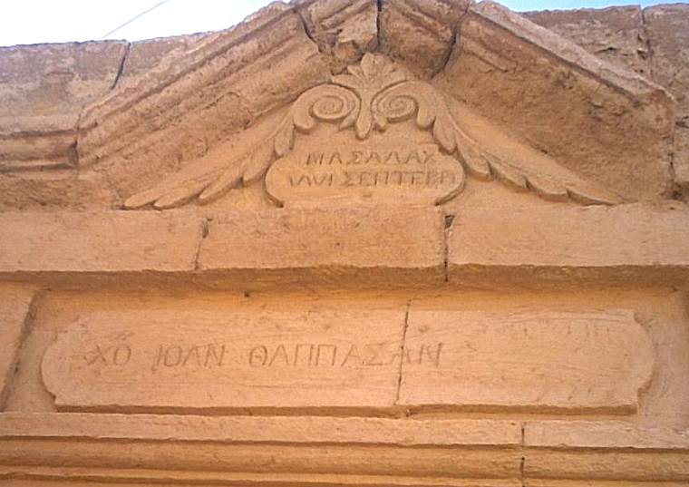 karamanlidika / Καραμανλήδικα / karamanlıca - writing: MAΣAΛAΧ; reading maşallah (found on door of house in Incesu, province Kayseri, Turkey)